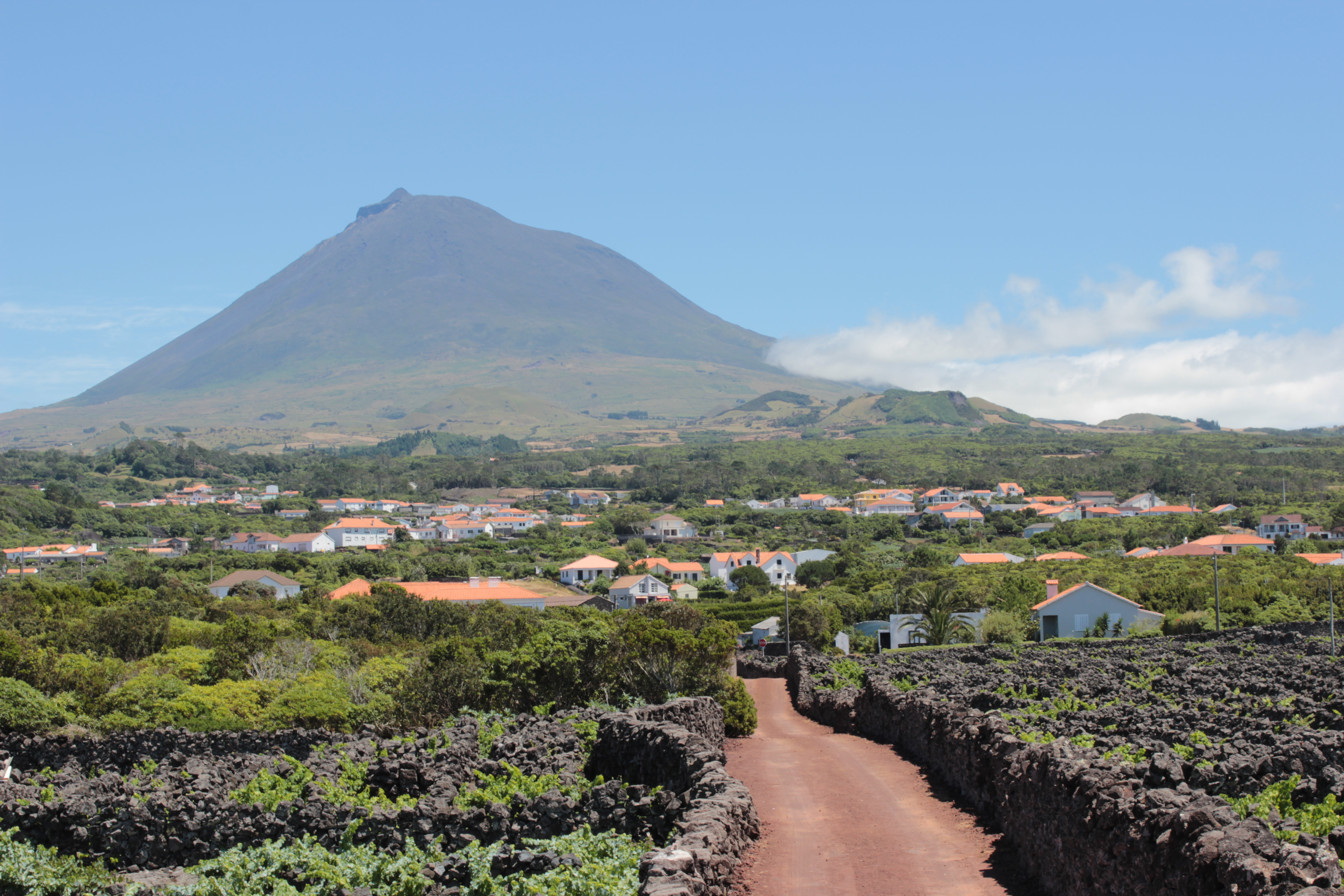 Madalena do Pico